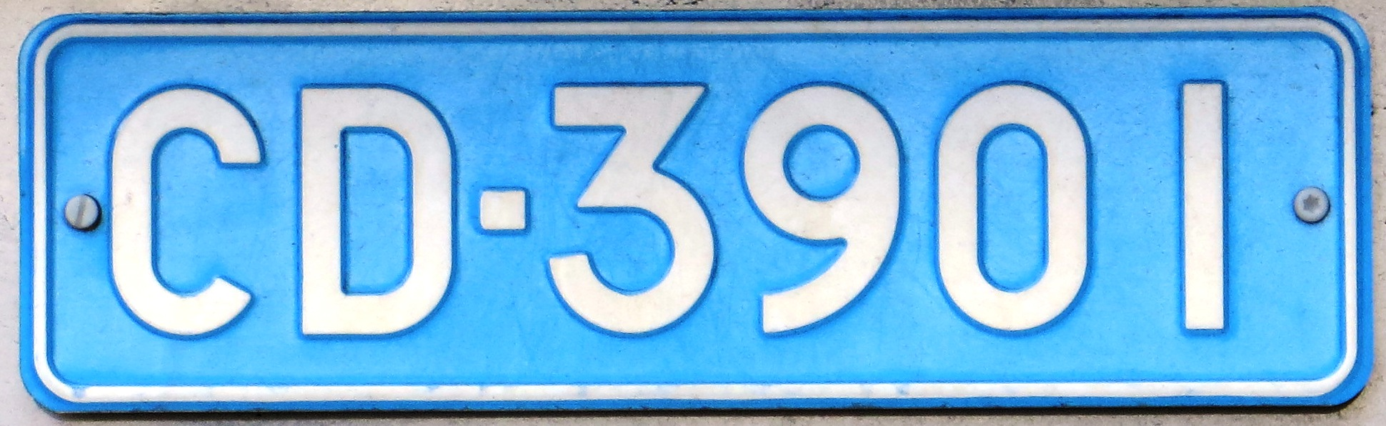 CD kentekenplaat Finland